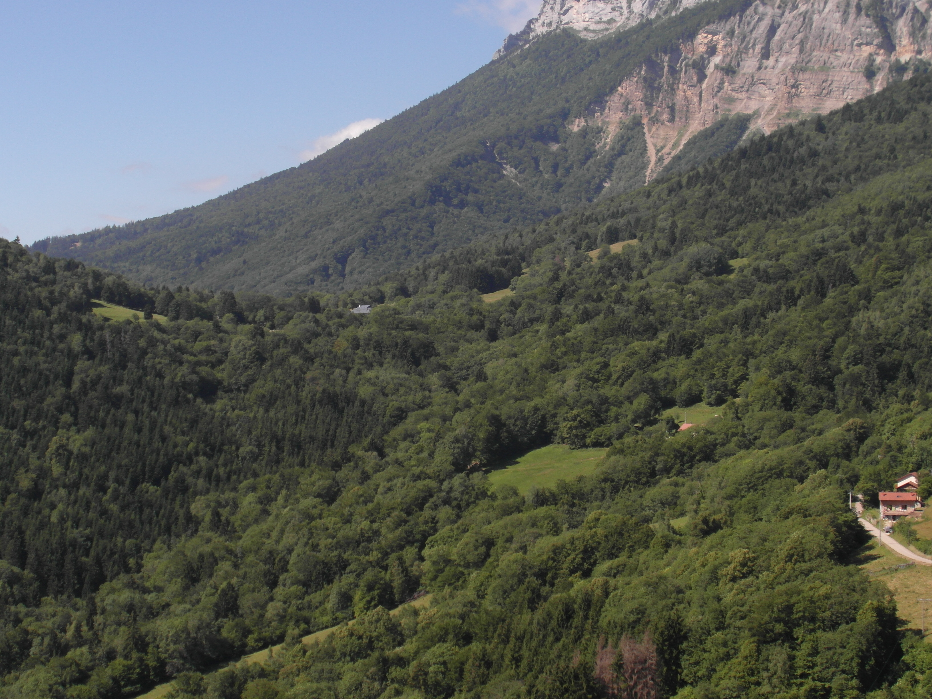 Foret du Boutat